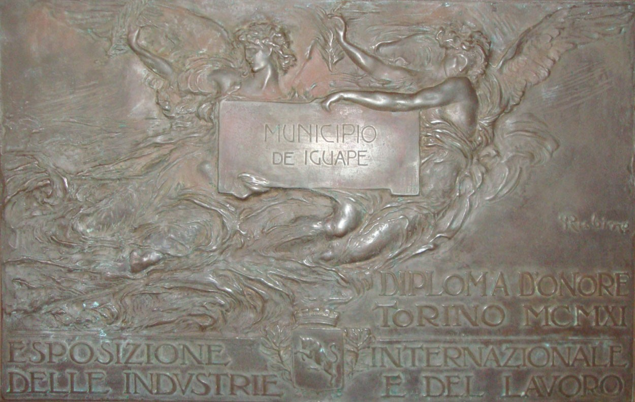 Em abril de 1911, o município de Iguape, representando o Brasil na Europa, conquistou o diploma de honra internacional de melhor arroz do mundo, disputado em Turim, Itália. Trata-se de uma placa de bronze, em alto relevo, conseguida na 1.ª Exposição Internacional da Indústria e do Trabalho, realizada em 29 de abril de 1911, em comemoração do cinquentenário do Reino da Itália em um evento extraordinário que chamou a multidão de milhares de visitantes, com presença dos monarcas das mais altas autoridades do Reino e os representantes de vários países, inclusive o Brasil que possuía dois pavilhões de exposições. O prêmio está assinado pelo escultor Edoardo Rubino (Itália, 1871-1954), e encontra-se exposto ao público no Museu Histórico e Arqueológico de Iguape, instalado no centro histórico. Nele vê-se escrito em italiano: "DIPLOMA D'ONORE" TORINO MCMXI, ESPOSIZIONE INTERNAZIONALE DELLE INDUSTRIE E DEL LAVORO.